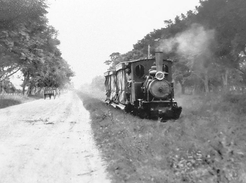 Tranvía rural a vapor hacia Yerba Buena - Atravesaba la Mate de Luna desde Córdoba al cerro (La Gaceta)